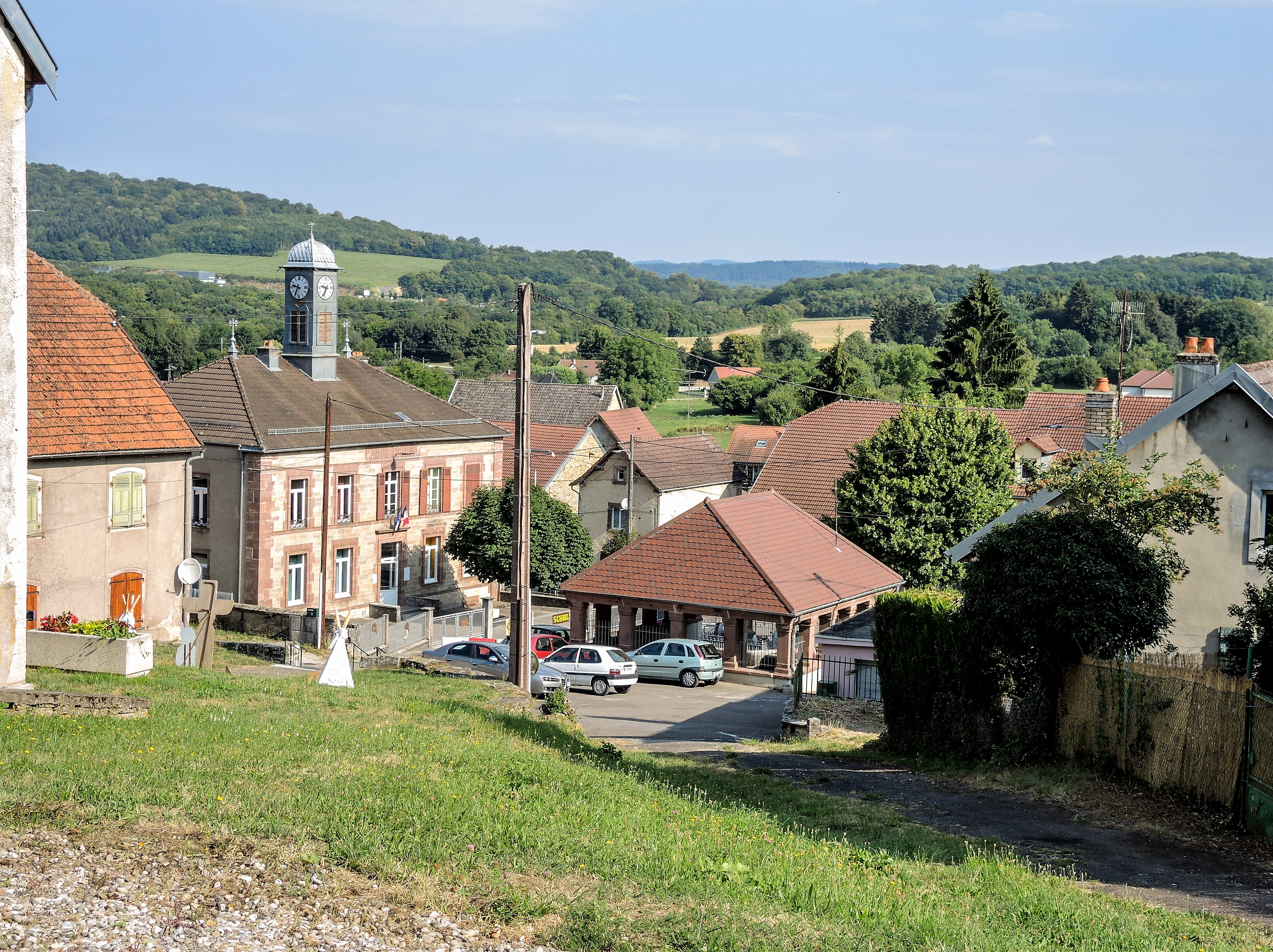 Centre du village, école et fontaine, vus de la rue des Chevrettes. Brévilliers. Haute-Saône